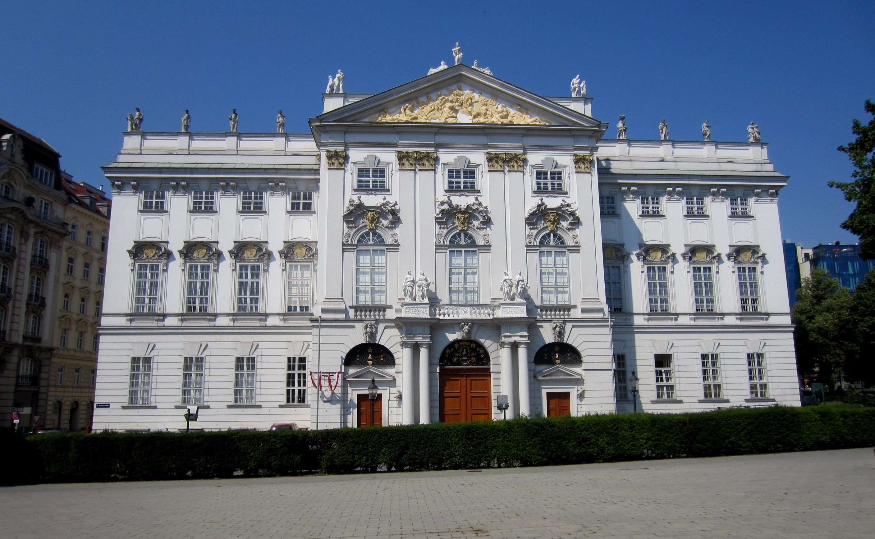 Das Palais Trautson im 7. Bezirk